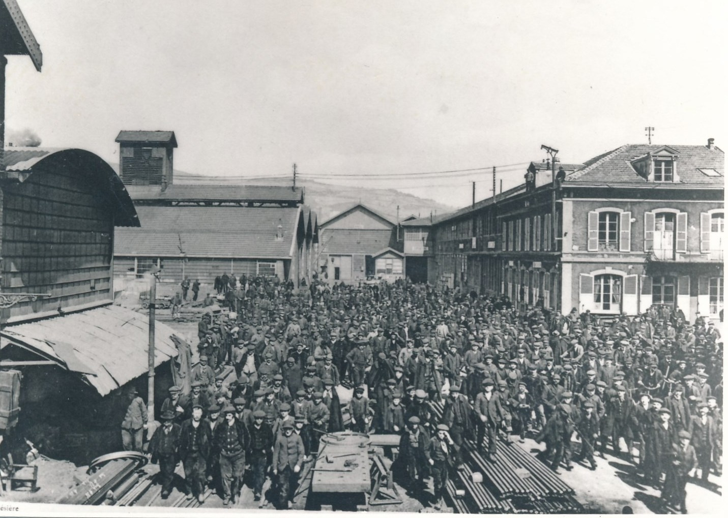 Fives-Lille, sortie d'usine, 1911. Archives municipales de Givors, cote 5Fi 1966